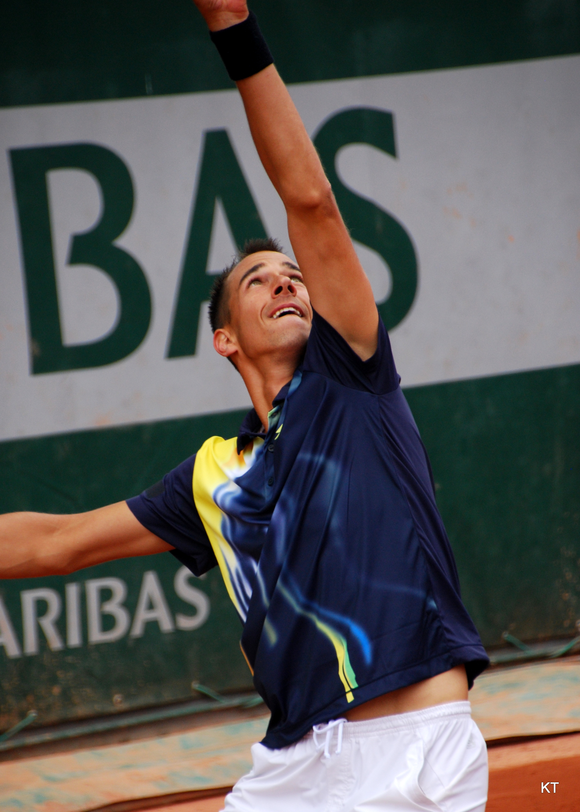 Rosol serve